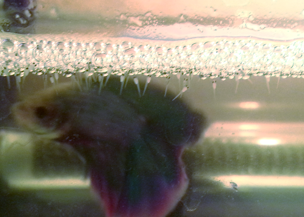 Alevines con tres días de nacidos.